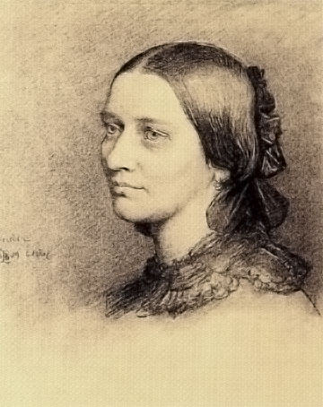 Clara Schumann (1819-1896), Kohlezeichnung